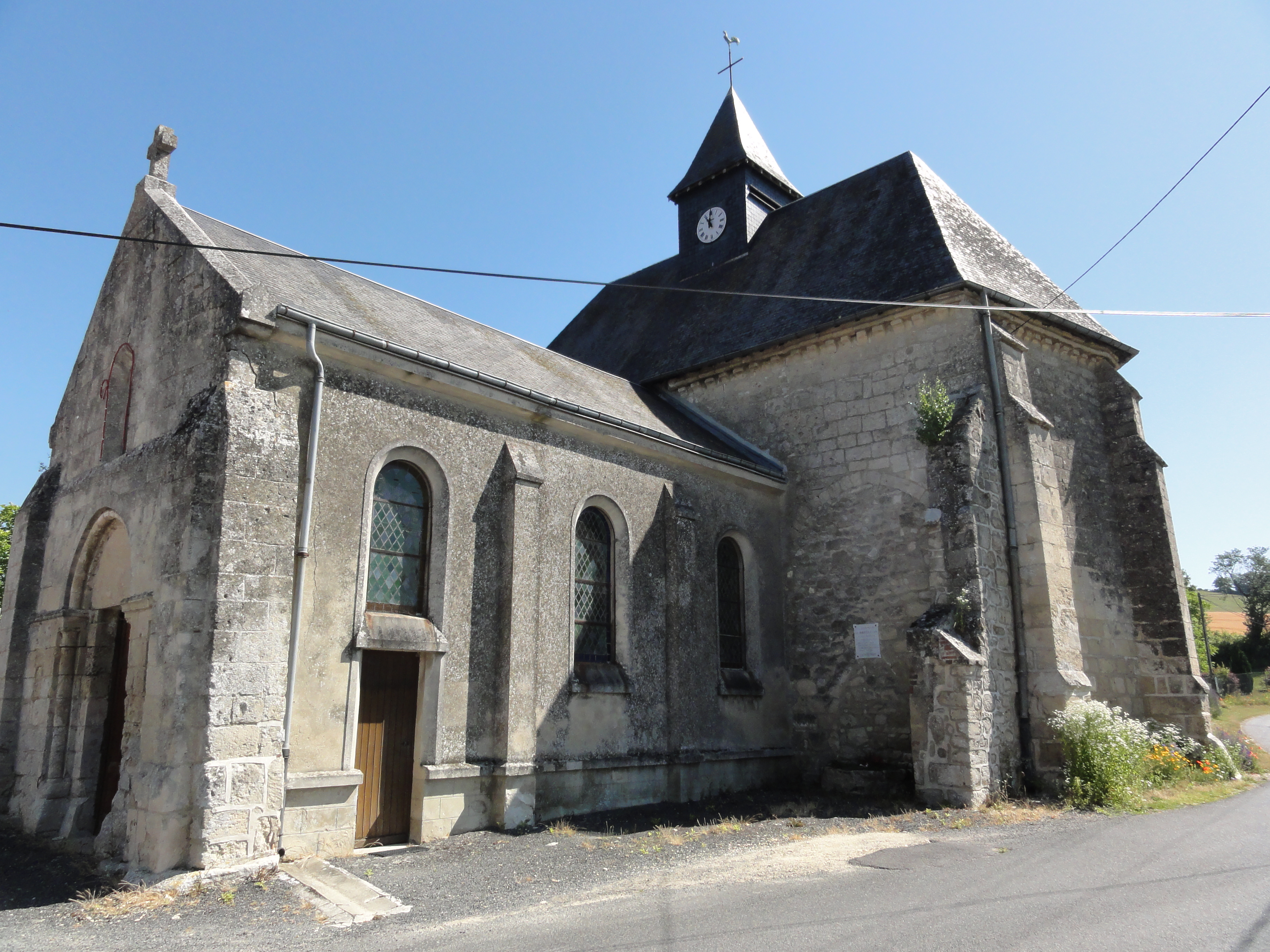 Révillon (Aisne) Église